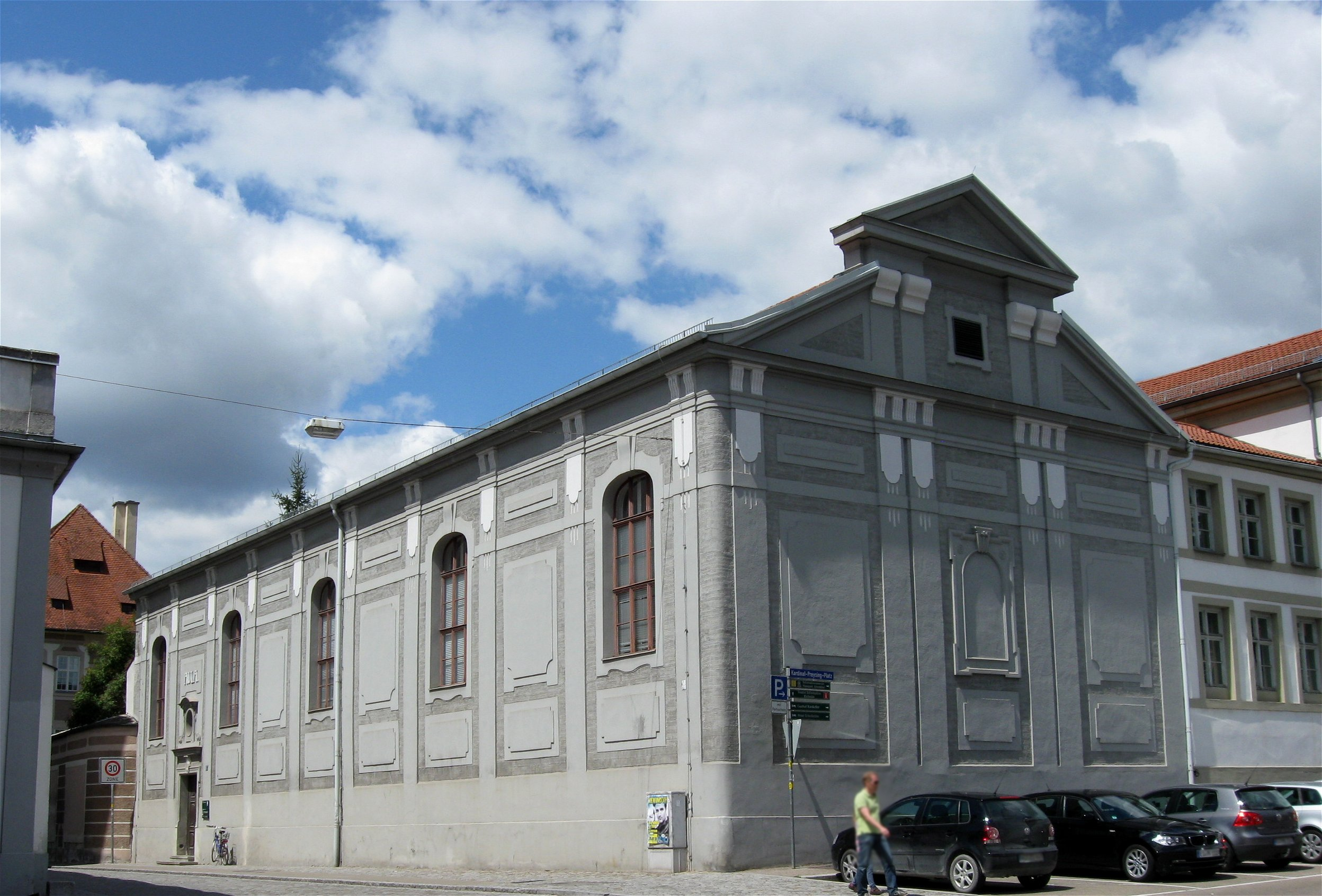 Ostenstraße 1; Teil des ehemaligen Hofstalles, Anfang 18. Jahrhundert, 1868/69 und 1903/04 zur Aula umgebaut, mit neubarocker Putzgliederung (siehe auch Kardinal-Preysing-Platz 1, 3).